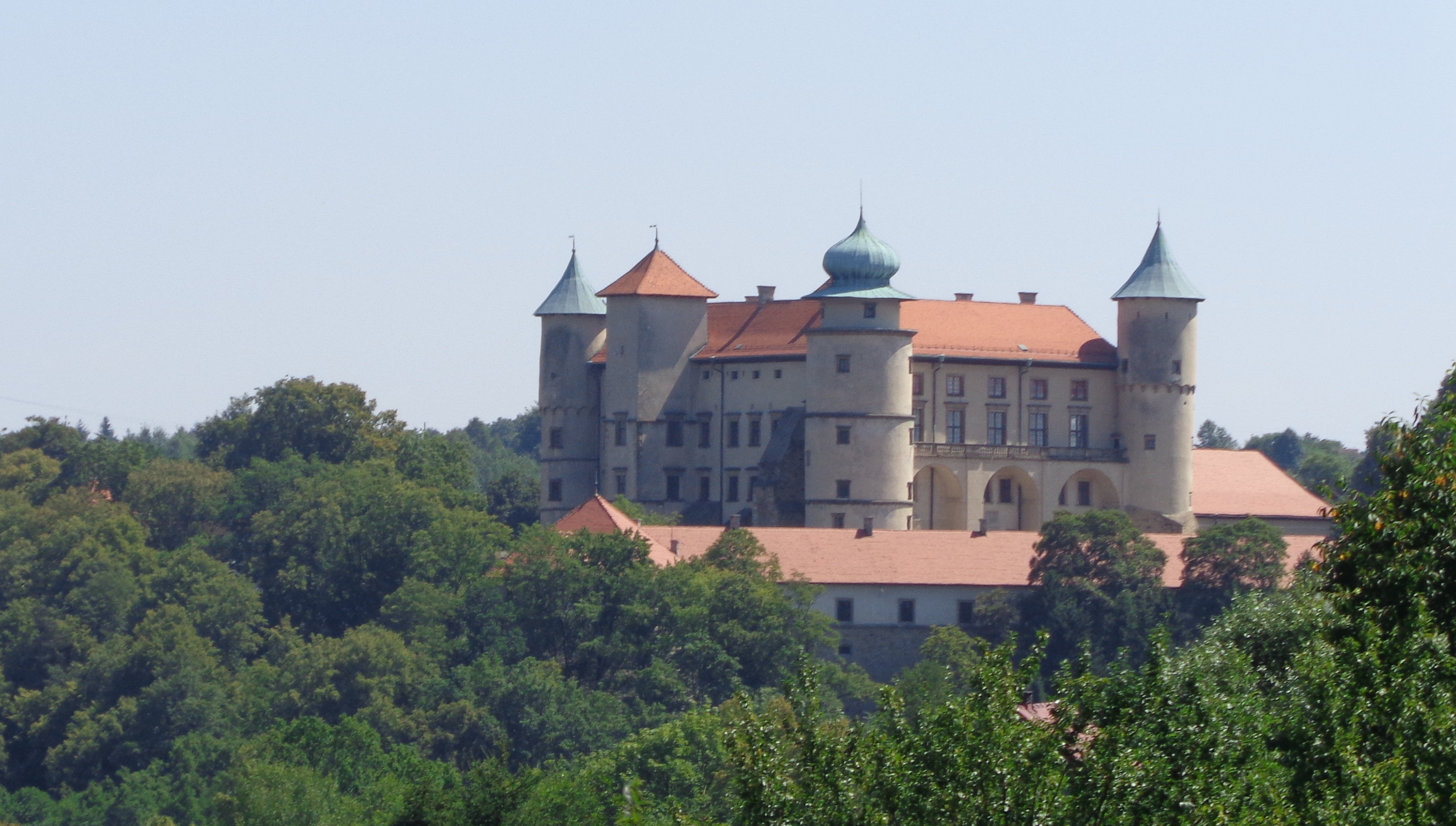 Nowy Wiśnicz, zamek, XVI, po 1620